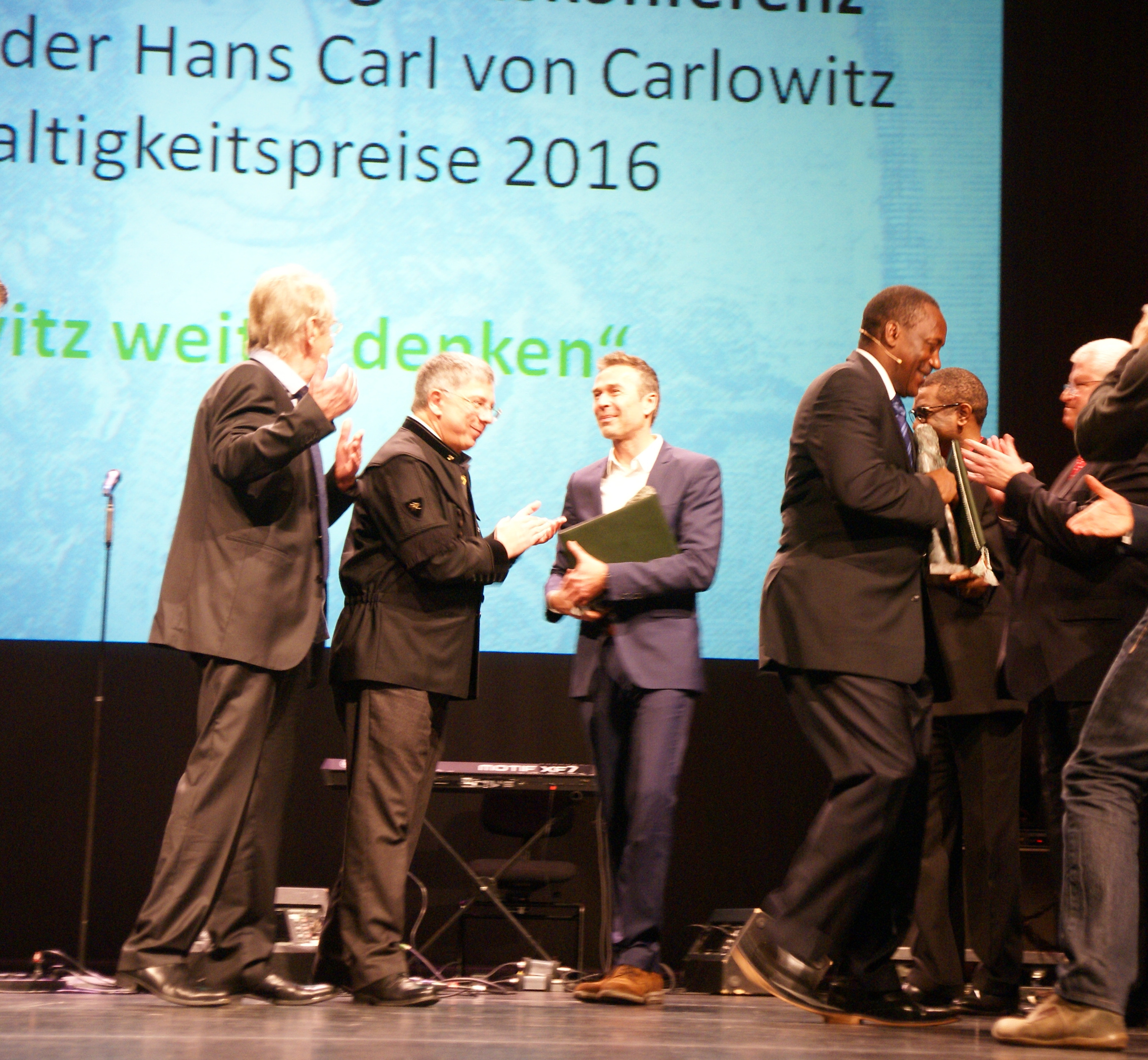 Preisverleihung 2016 an Dr. Kandeh K. Yumkella und Dirk Steffens. Personen von links nach rechts: Dieter Füßlein, Vorsitzender der Hans-Carl-von-Carlowitz-Gesellschaft zur Förderung der Nachhaltigkeit; 3. v.l. Dirk Steffens, Preisträger; Kandeh K. Yumkella, Preisträger; Youssou N Dour, Laudator für Yumkella; Staatssekretär im Umweltministerium Sachsens, Herbert Wolff.